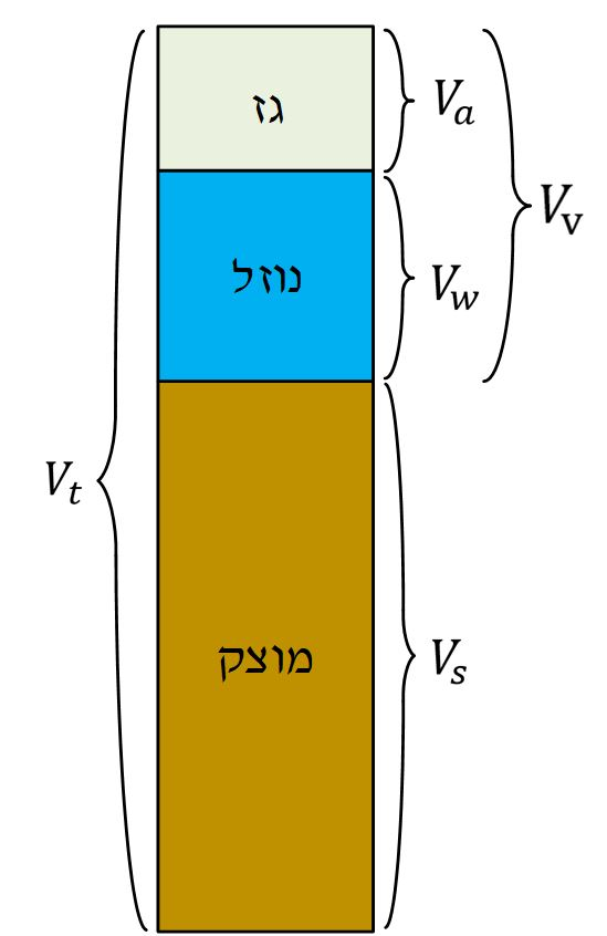 תיאור של הקוביה אלמנטרית בקרקעות מבחינת נפח